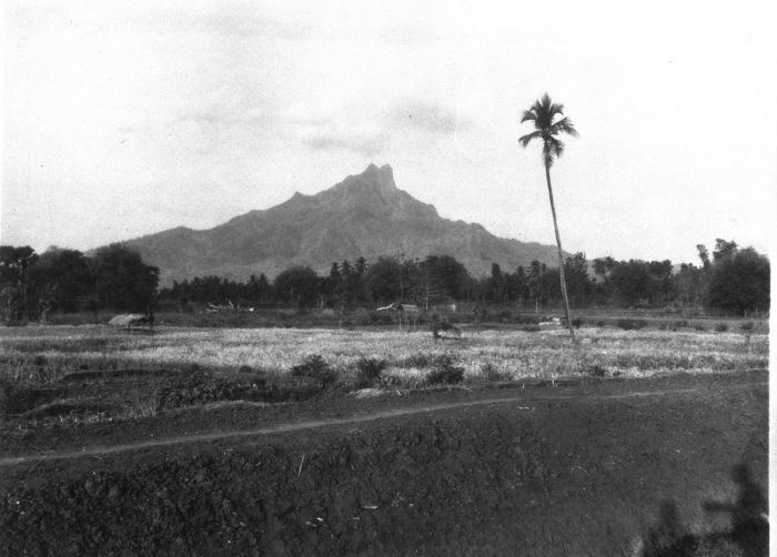 Foto. De Goenoeng Ringgit gezien vanaf de weg naar Besoeki, Oost-Java